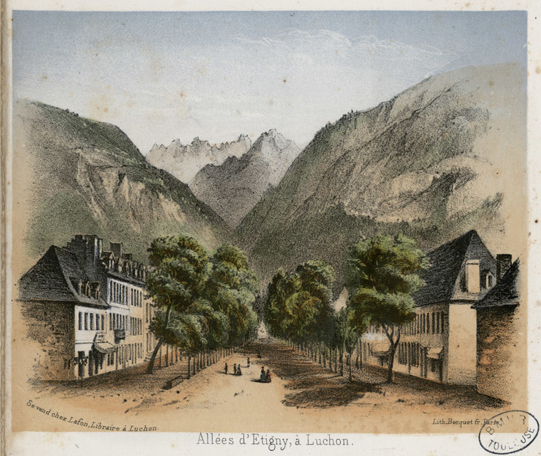 Fait partie d'un album dépliant de 16 planches en couleurs et gommées, non signées, de Gorse. Imprimerie Becquet frères à Paris. Se vendent chez Lafon, libraire à Luchon. Ancely, René (1876 - 1966). Possesseur